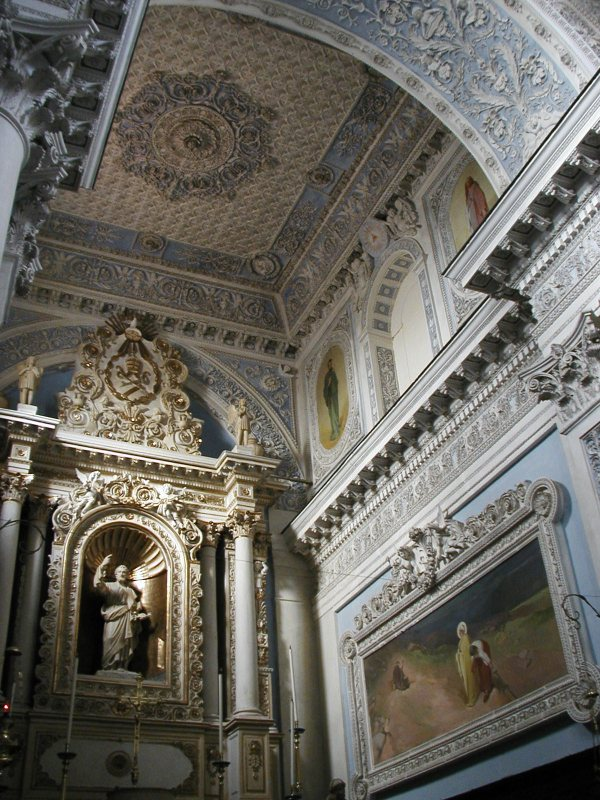 Rogliano SanPietro L'Altare dedicato al Santo(Foto di Luigino C.)